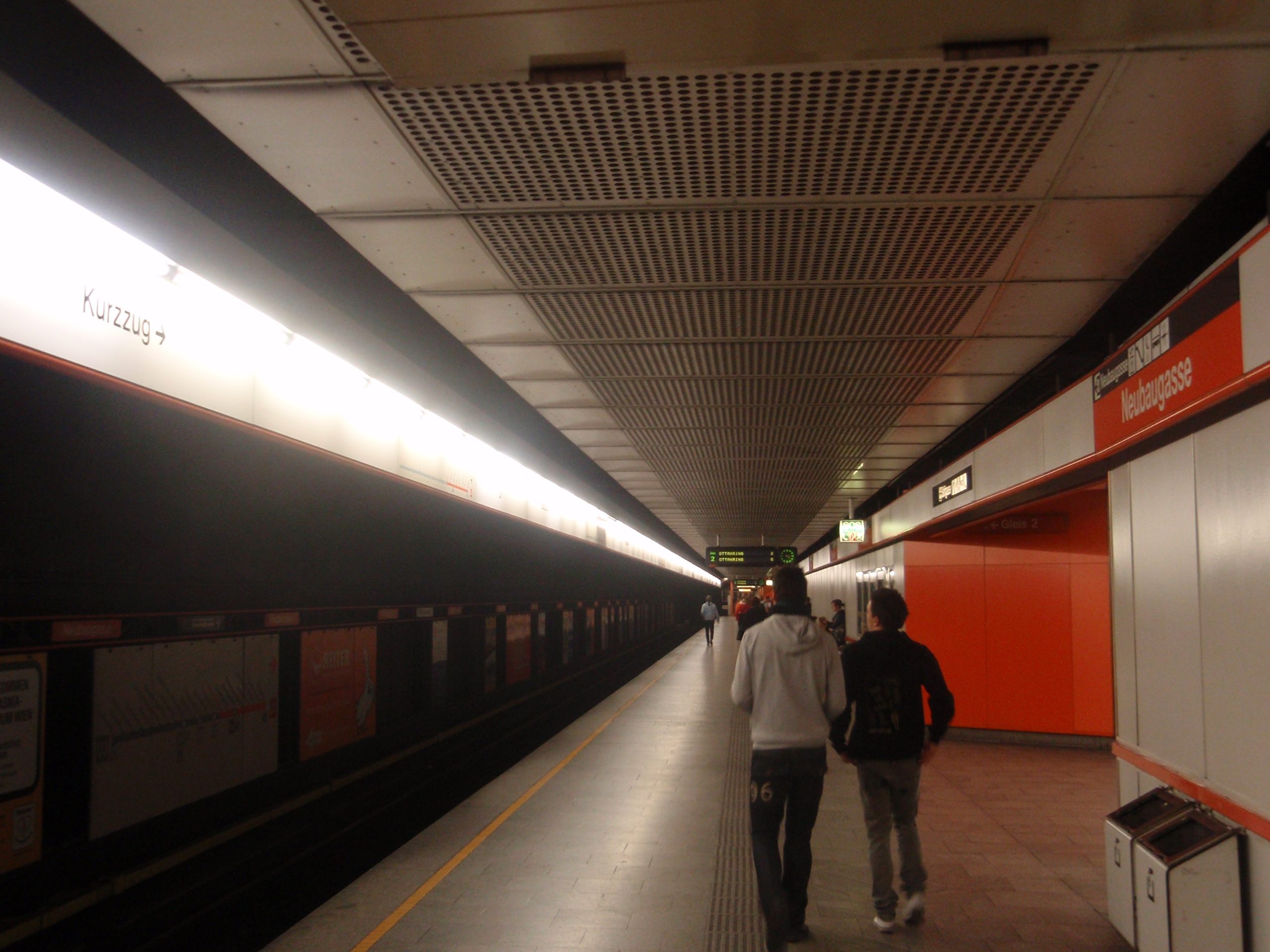 U3-Station Neubaugasse